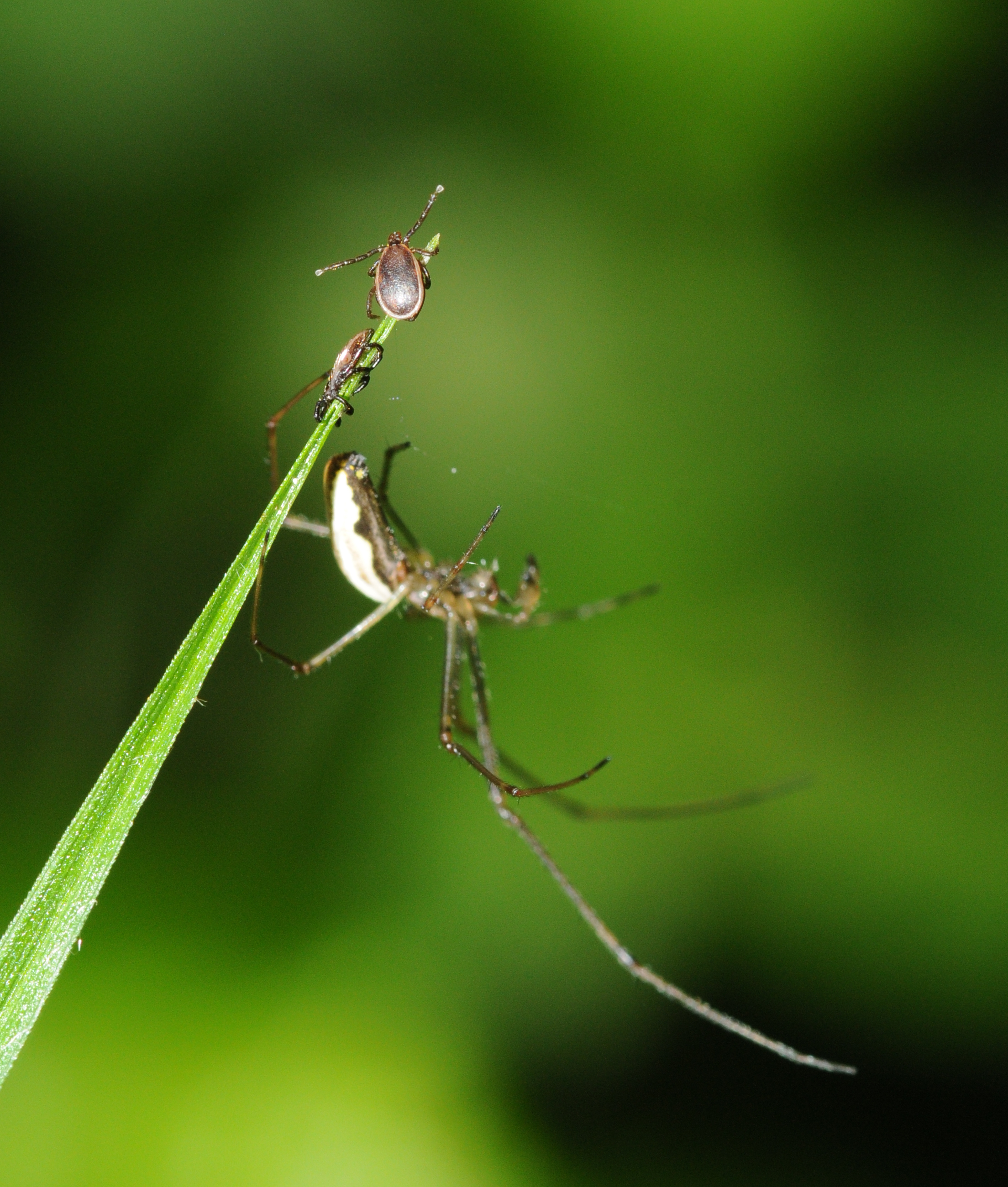 Tique (ainsi qu'une araignée).